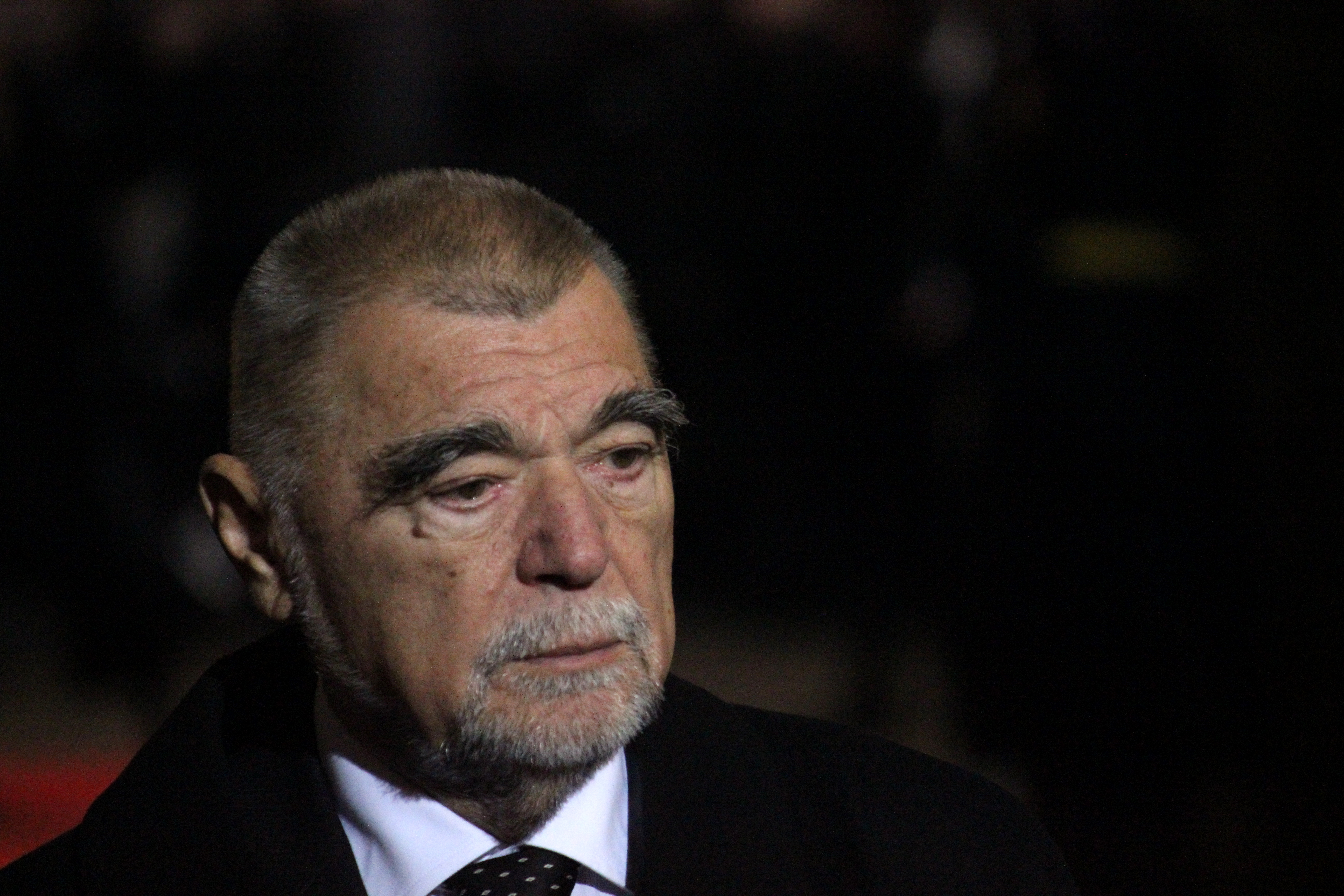 Description